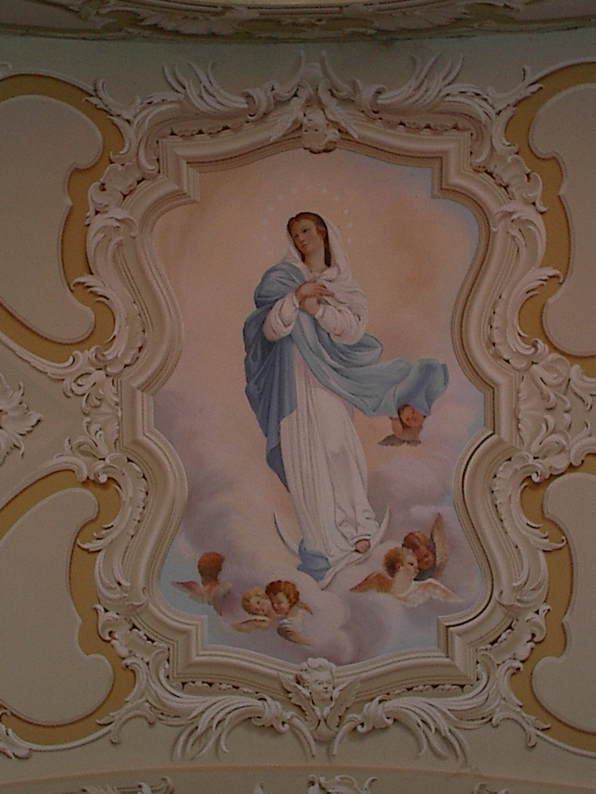 affresco dell'Assunta dipinto da Angelino Capelli nella chiesa di Cicogni di Pecorara (PC)